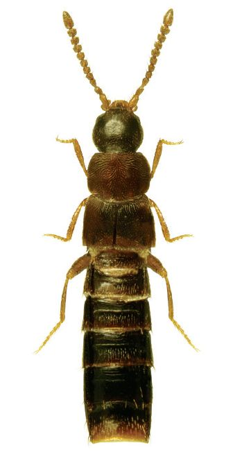 Schistoglossa brunswickensis